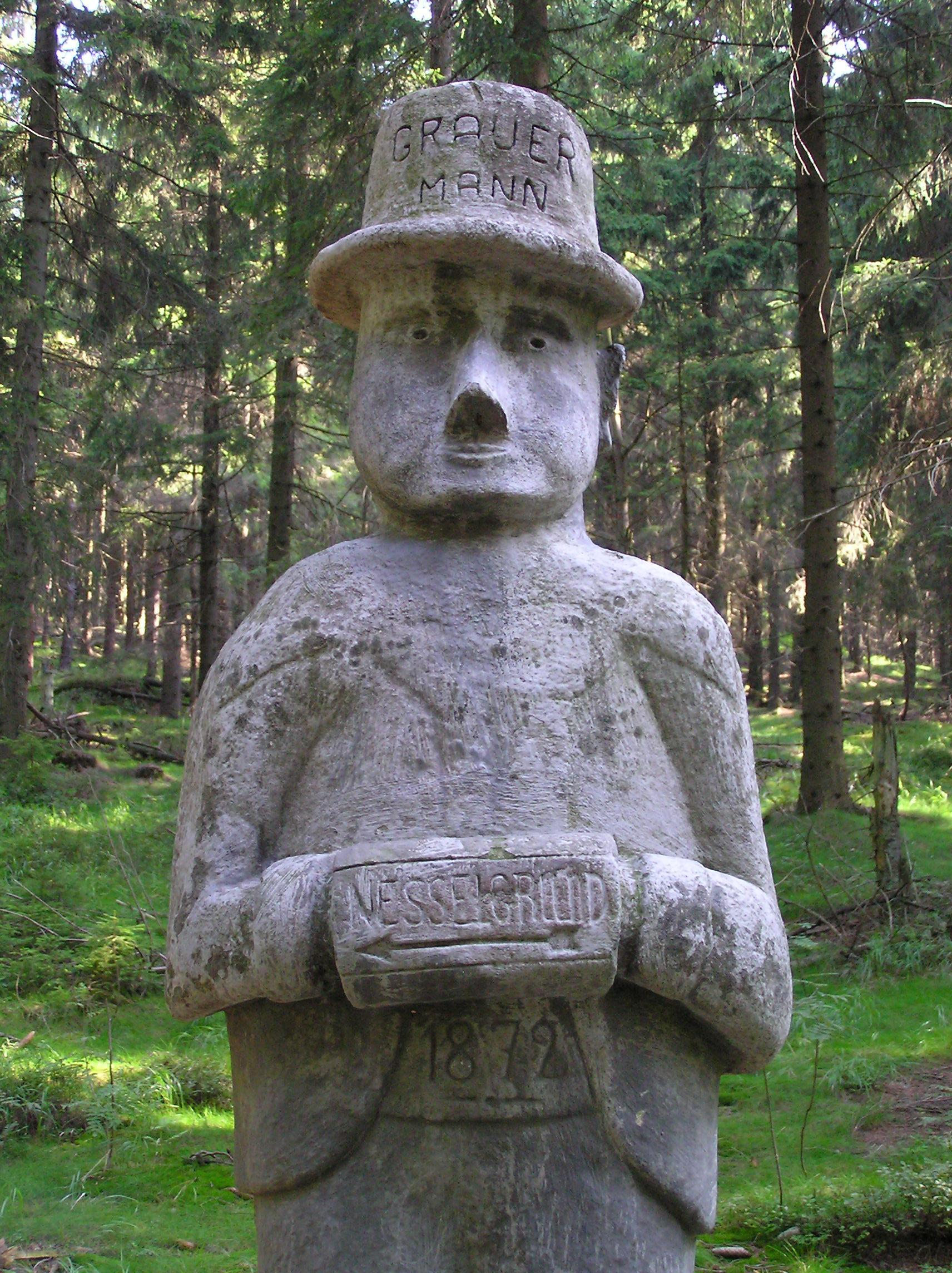 Steinerner Mann oder Grauer Mann an der "Spätenwalder Ewigkeit" (Wieczność) genannten Waldschneise im Nesselgrunder Forst, Habelschwerdter Gebirge, Woiwodschaft Niederschlesien, Polen.